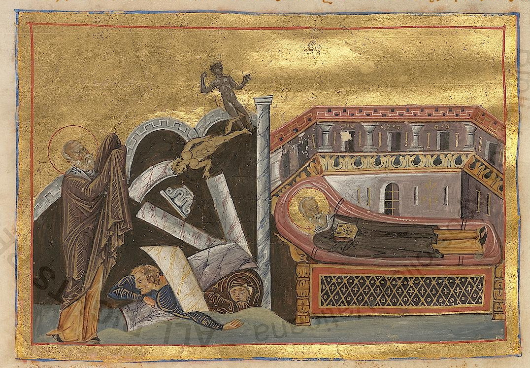 Священномученик Корнилий сотник Константинополь. 985 г. Миниатюра Минология Василия II. Ватиканская библиотека. Рим.